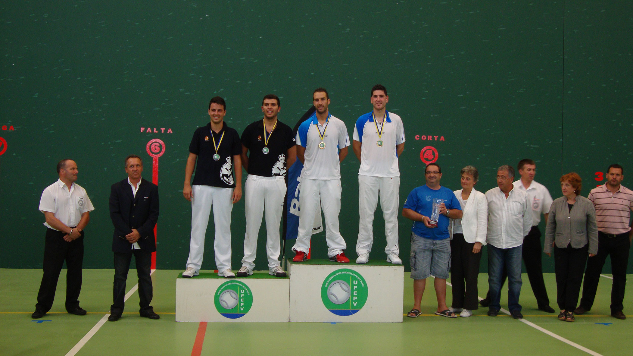 podium